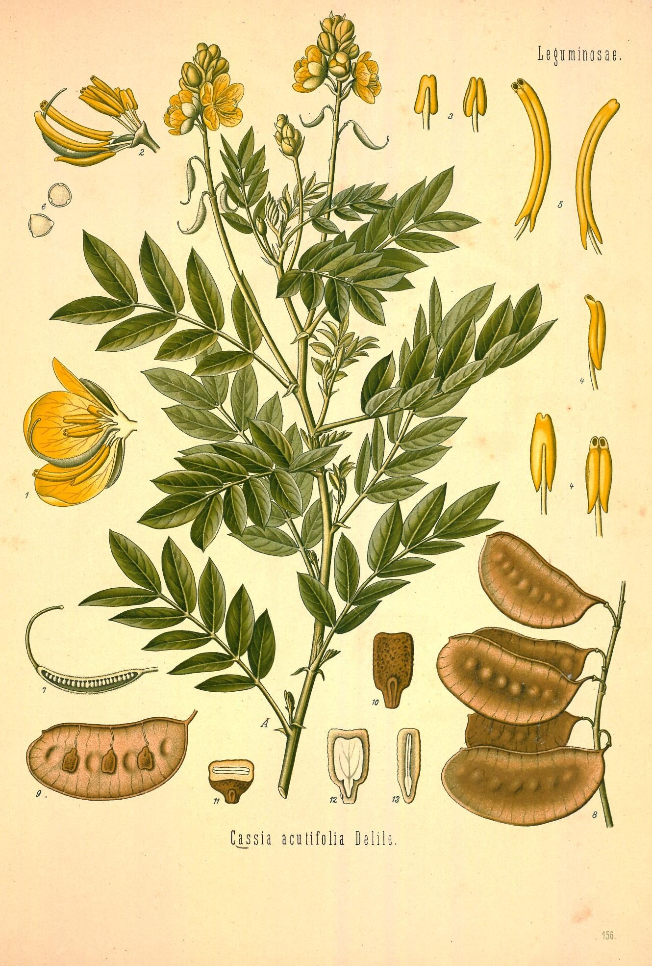 Alexandrinische Senna. A oberer Theil der blühenden Pflanze, nat. Gr.; 1 Blüthe im Längsschnitt, vergrössert; 2 dieselbe ohne Krön- und Kelchblätter, desgl. ; 3, 4, 5 Staubgefässe, desgl. ; 6 Pollen, desgl. ; 7 Stempel mit Fruchtknoten im Längsschnitt,desgl.; 8 Fruchttraube, nat. Gr.; 9 Fruchthälfte mit Samen, desgl.; 10 Same, vergrössert; 11, 12, 13 derselbe im Quer- und Längsschnitt, desgl.